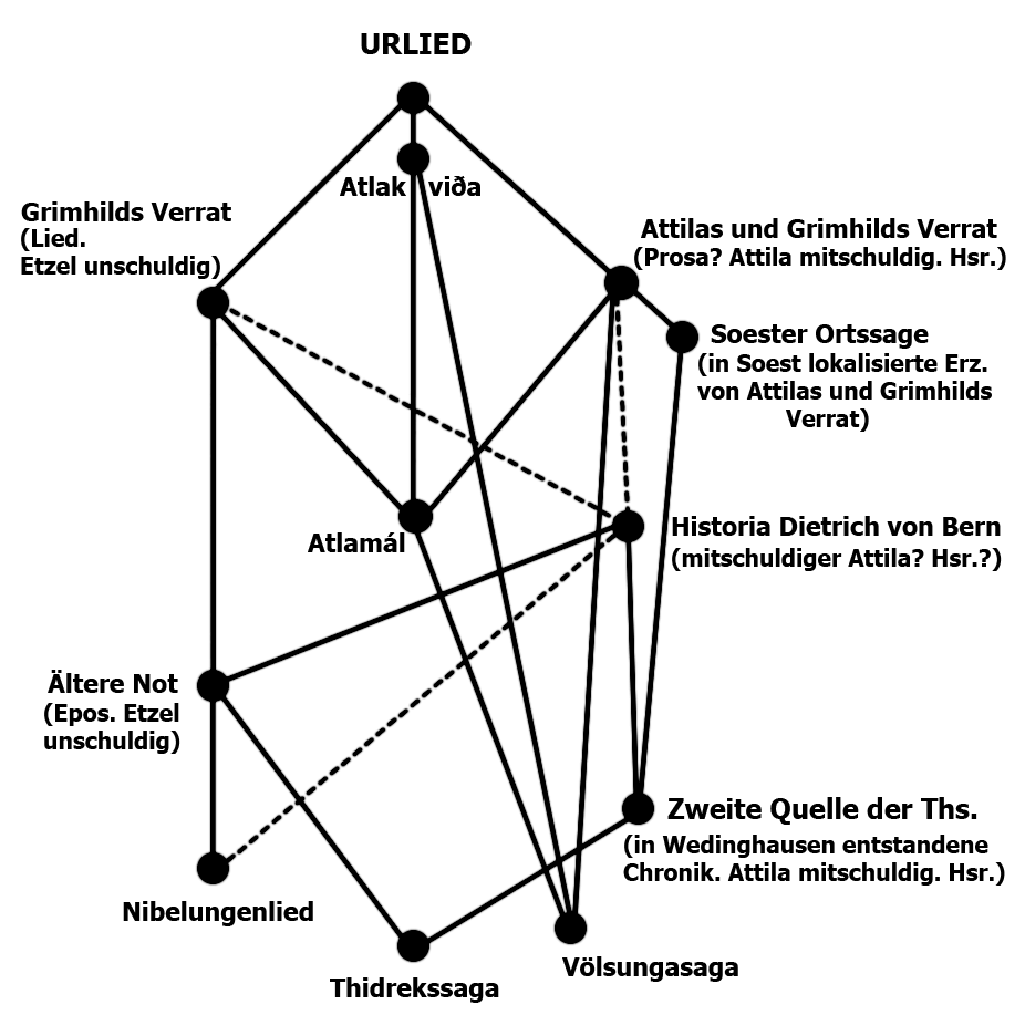 Stemma Thidrekssaga nach R. Wisniewski